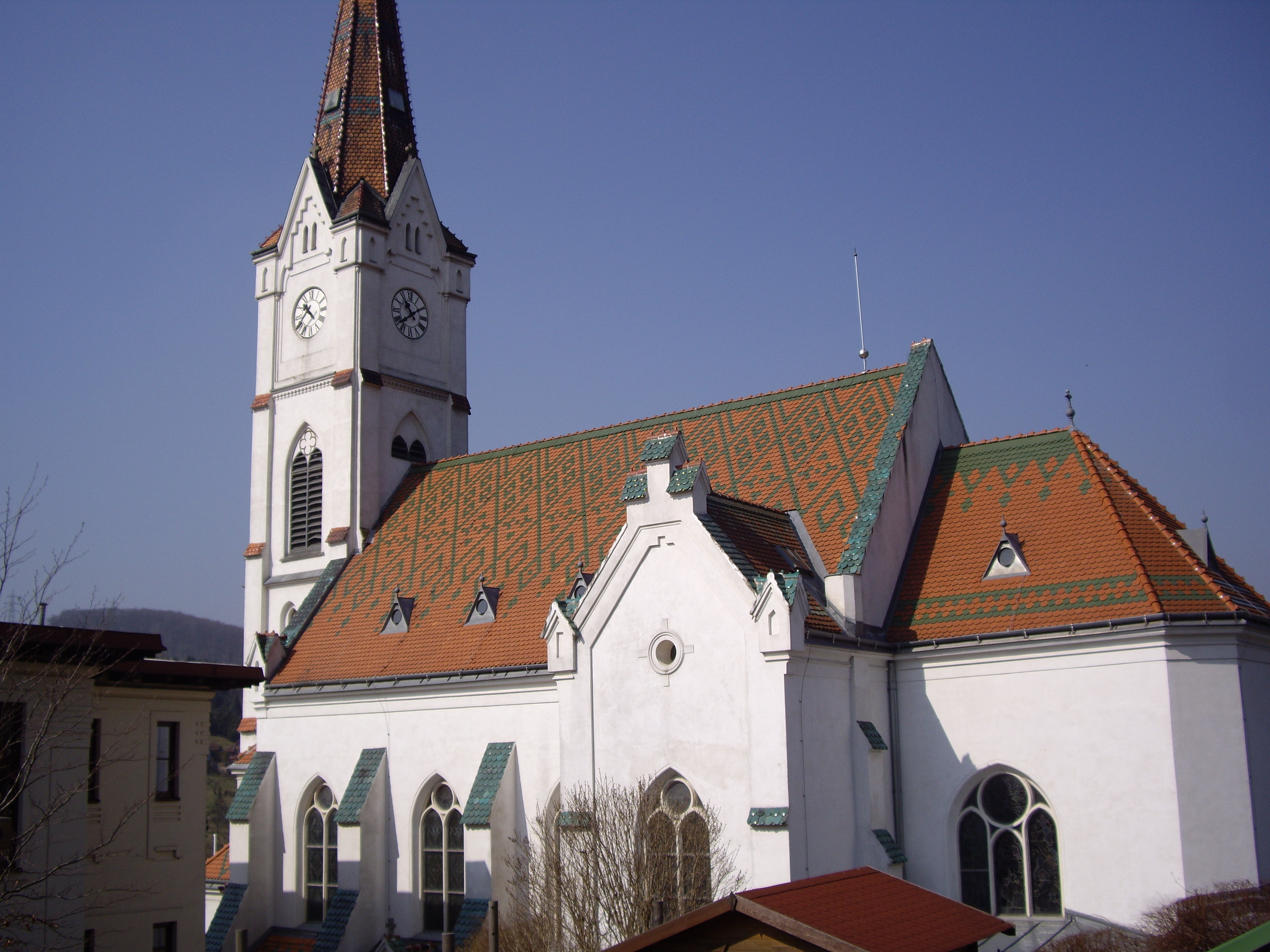 Pilgrimkirko Maria Gugging "Maria, Reĝino de la Anĝeloj".